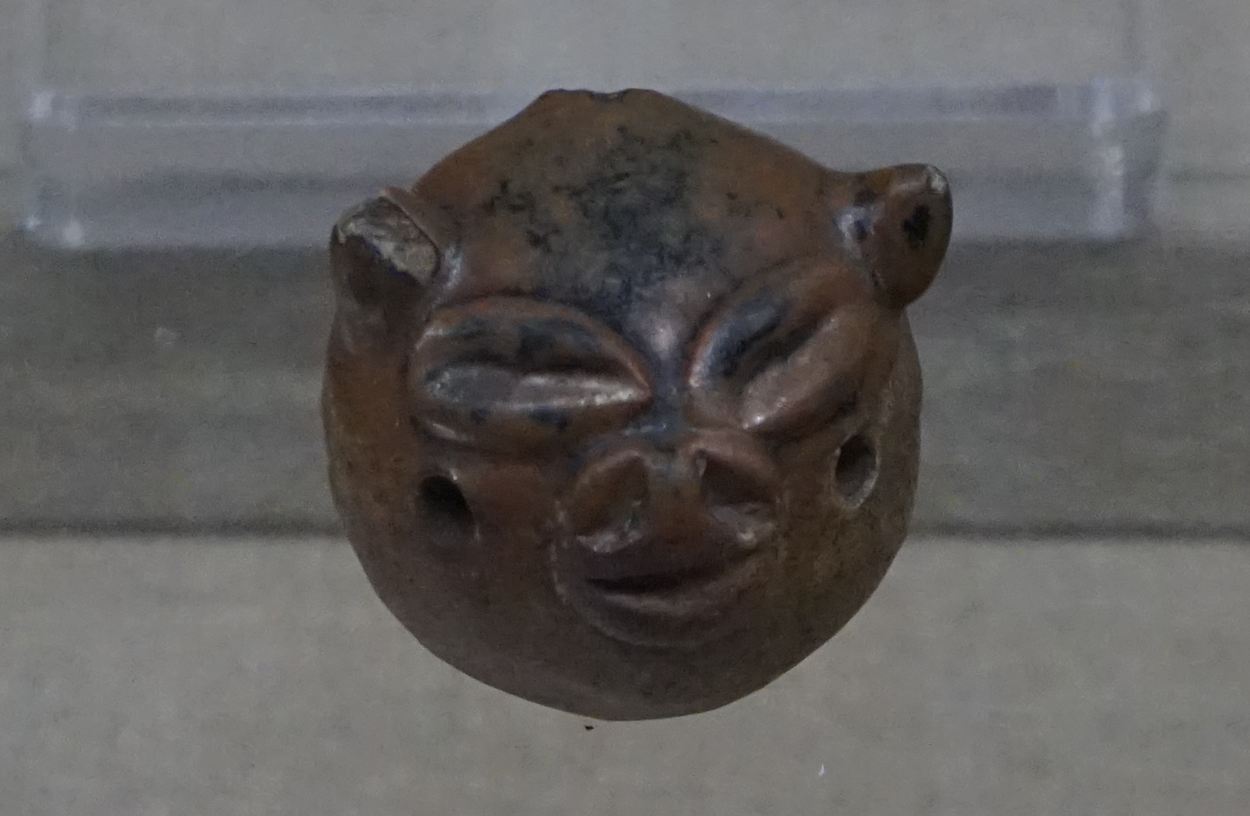 中文（中国大陆）: 猪首瓷埙 肇东市八里城出土。反映了女真人善于养猪的传统生业方式